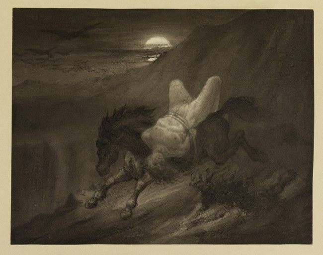 Projet d'illustration pour le poème de Victor Hugo du recueil "Les Orientales", XXXIV, "Mazeppa"